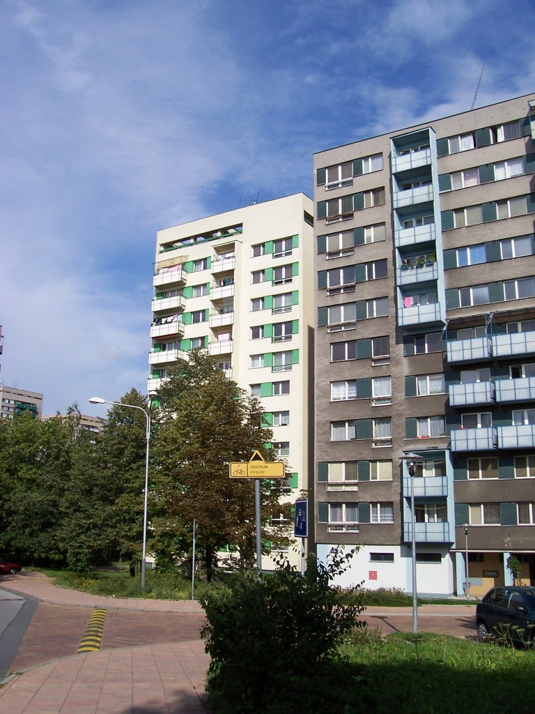 Panelové domy v Mariánských Horách.